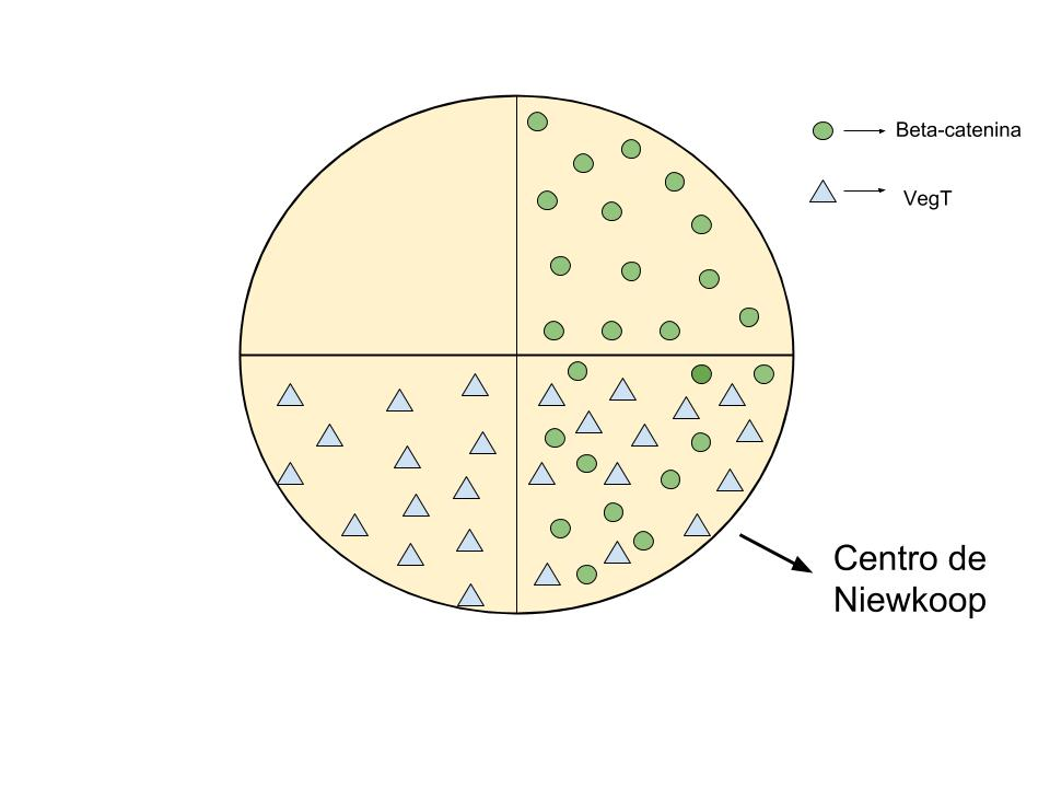 Centro de Niewkopp